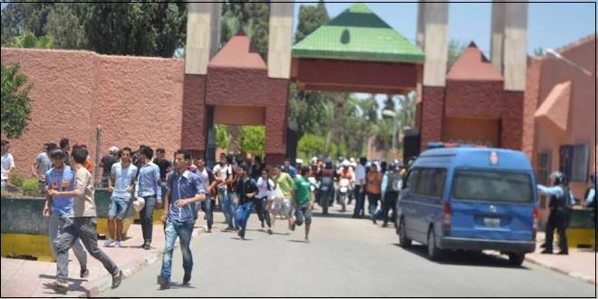 مشاجرات الجامعات